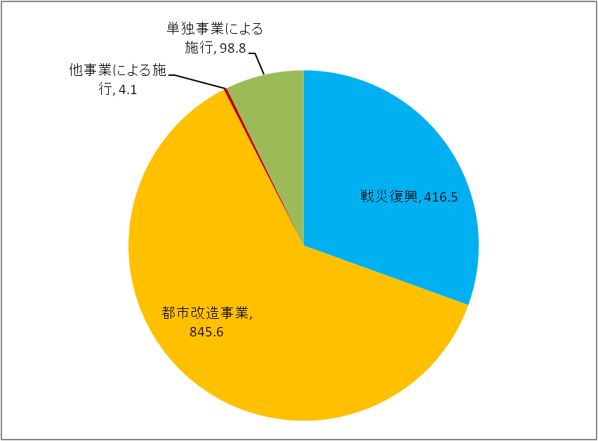 戦災復興事業区域面積（単位:ha 東京都・収束計画）※数値は戦災復興誌による